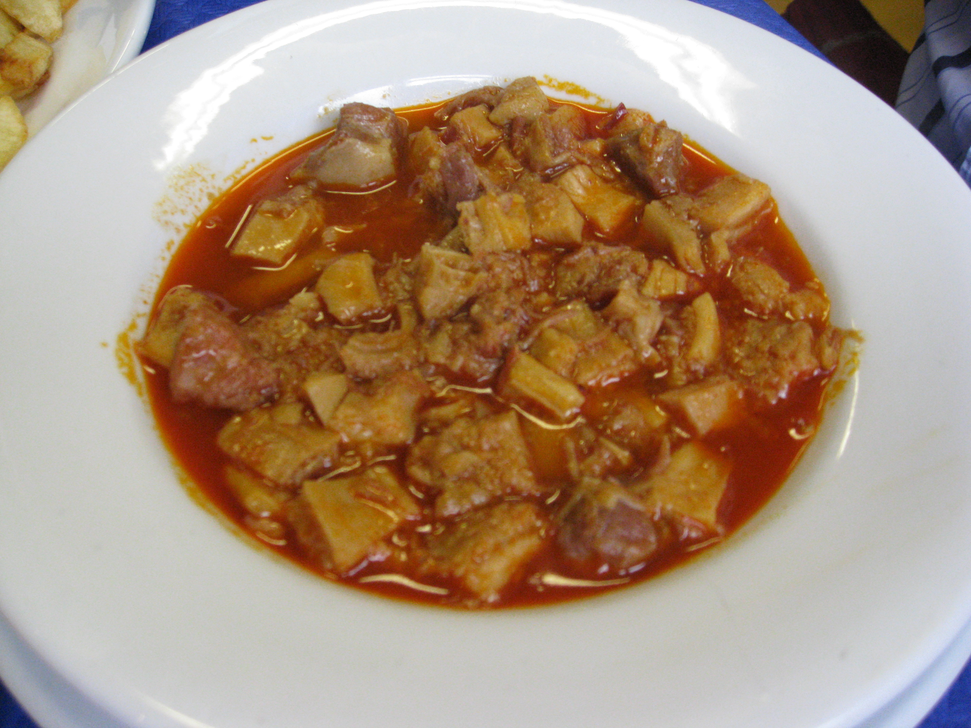 Callos Comida en casa el Sastre, gran calladoComida en el Sastre